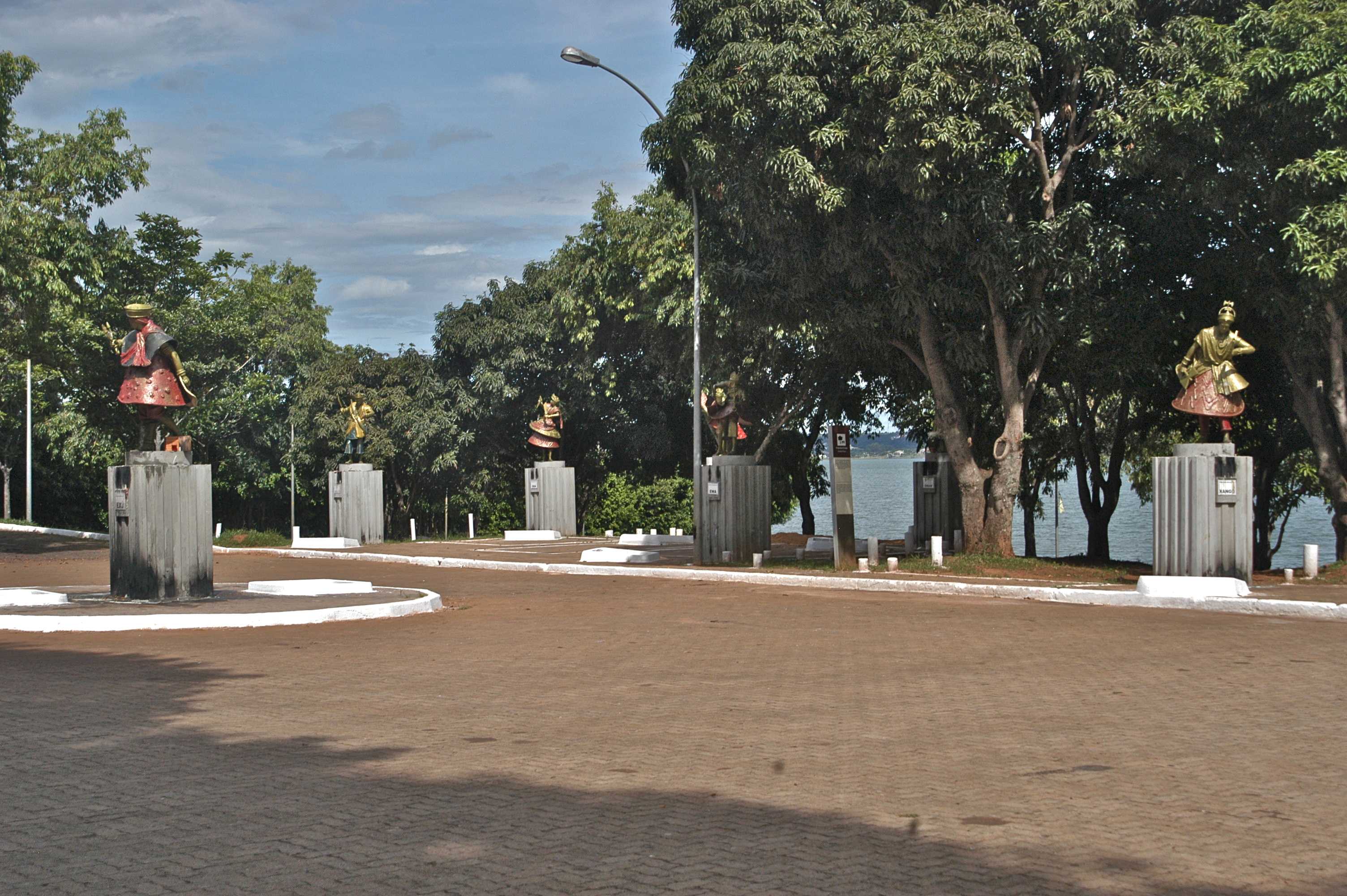 Praça dos Orixás, ao lado da ponte costa e silva, lado cidade.